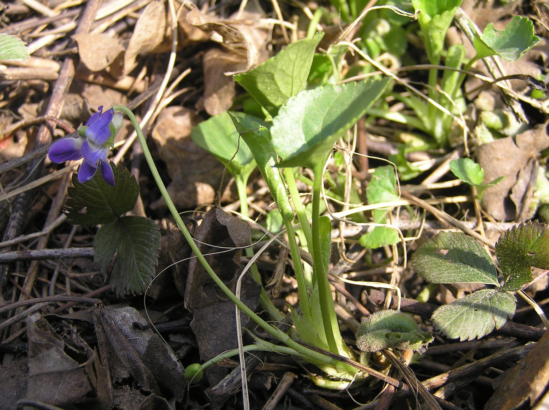 Viola suavis, Brno-Obřany, Czech Republic